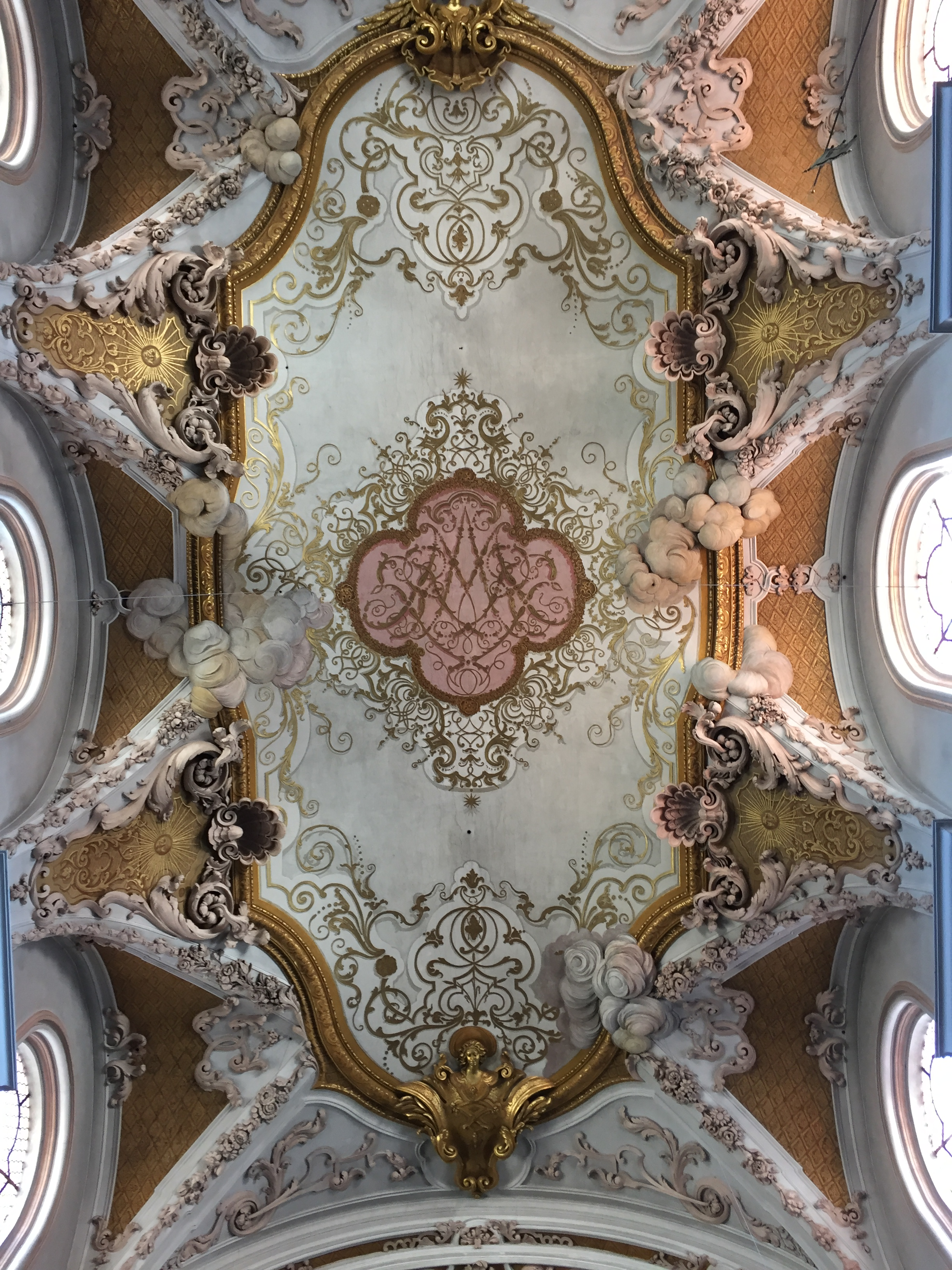 Kloster Rohr Asam Kirche innen Decke im Hauptschiff